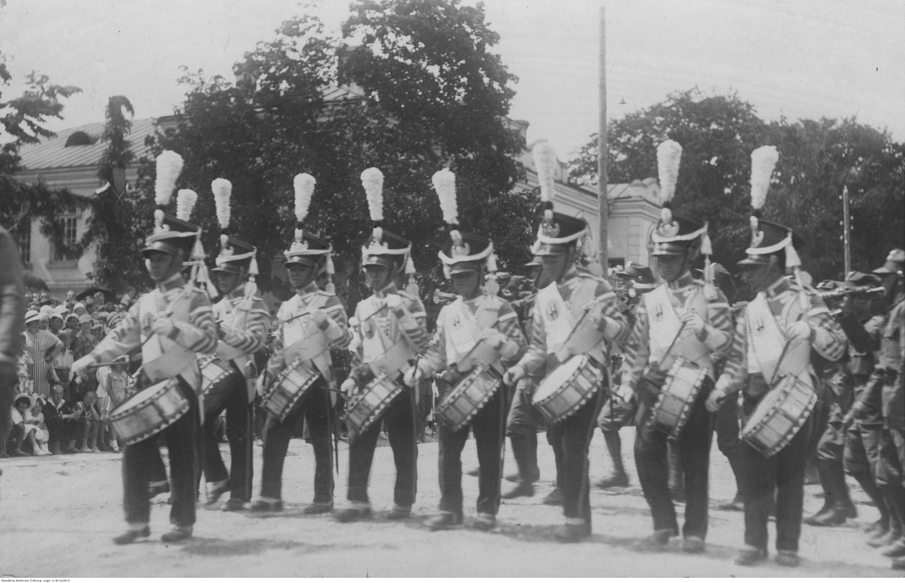 Święto 13 Dywizji Piechoty w Równem. Dobosze 45 Pułku Piechoty Strzelców Kresowych w historycznych strojach legii gen. Józefa Zajączka. Koncern Ilustrowany Kurier Codzienny - Archiwum Ilustracji. Sygnatura: 1-W-1143-2